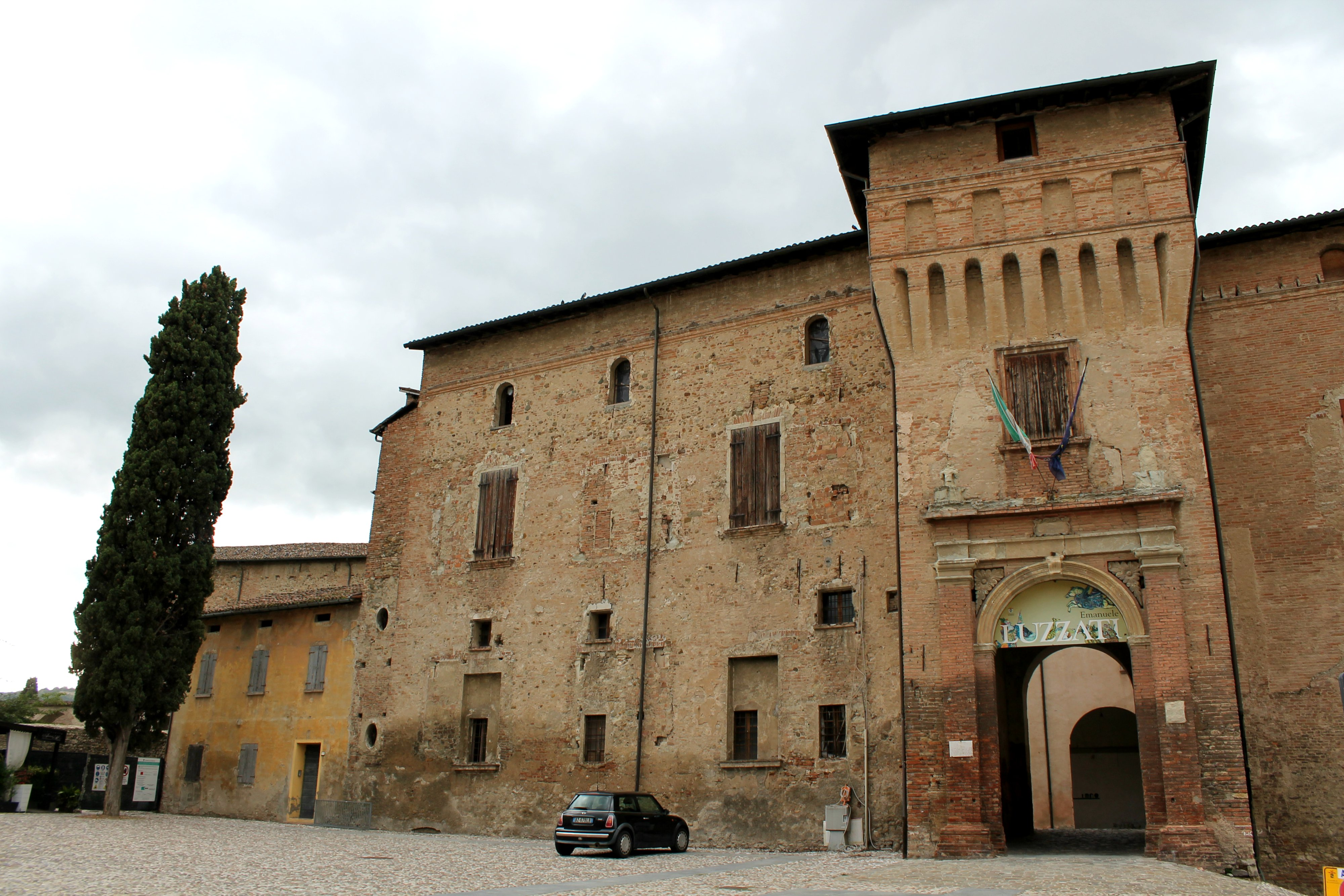 Rocca del Boiardo - esterno, cortile e appartamento estense, scalone This is a photo of a monument which is part of cultural heritage of Italy.